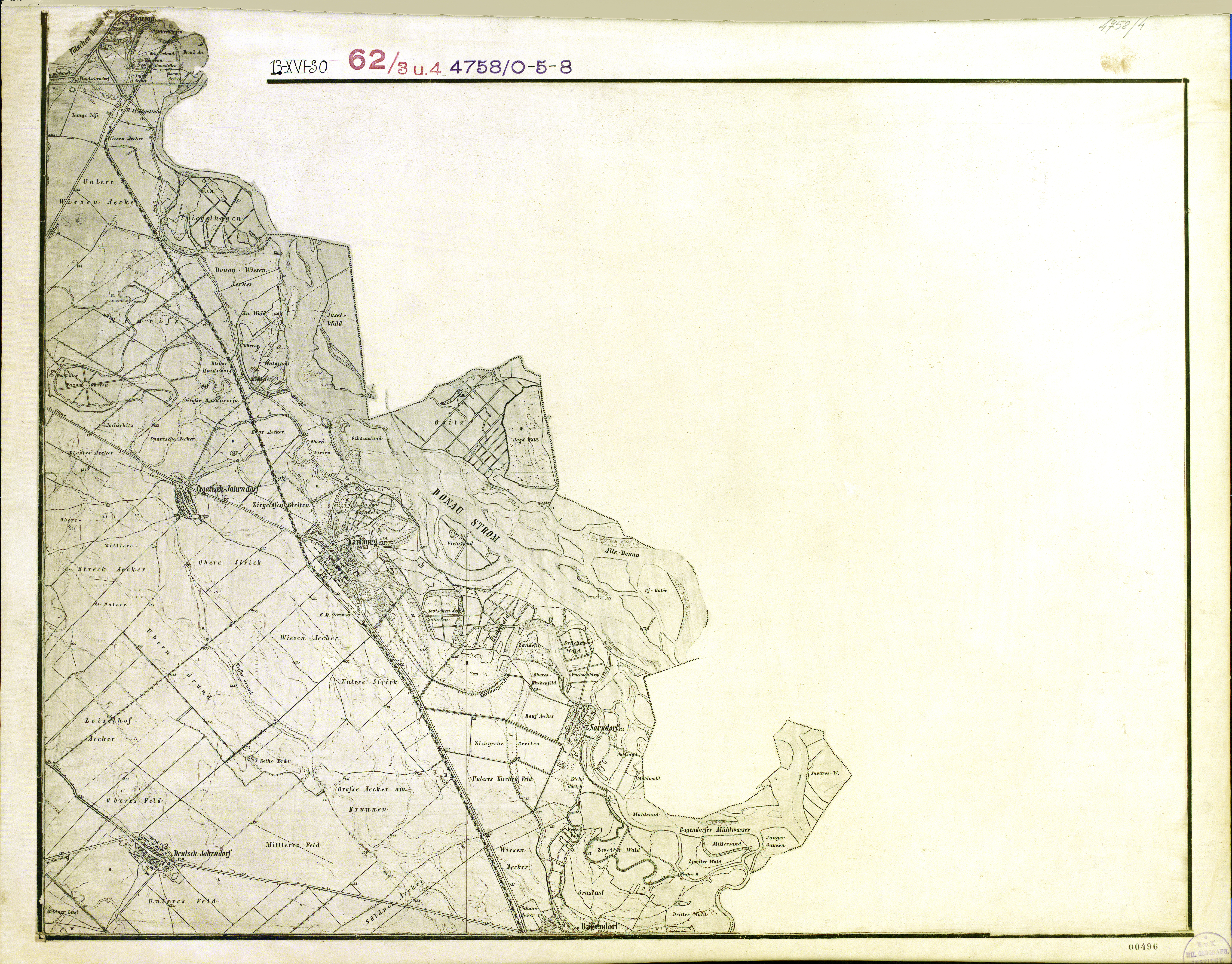 historische Landkarte: Arbeitsfassung von: Gradkartenblatt Zone 13 Colonne XVI Section SO (Südost) (später 4758/O-5-8 oder 4758/4), ungarisch-österreichischer-tschechoslowakisch/slowakischer Teil im Südwesten, der Nordosten befindet sich auf einem anderen Blatt gleicher Nummerierung. Engerau / Ligetfalu / Petrzalka, Croatisch Jahrndorf / Horvátjárfalu / Jarovce, Deutsch Jahrndorf / Németjárfalu / Nemecké Jarovce, Karlburg / Oroszvár / Rusovce, Sarndorf / Dunacsún / Csún / Čunovo in Österreich (Deutsch Jahrndorf), Ungarn, ab 1947 teilweise Tschechoslowakei, dann Slowakei. Franzisco-josephinische (3.) Landesaufnahme der österreichisch-ungarischen Monarchie. Maßstab 1:25.000.